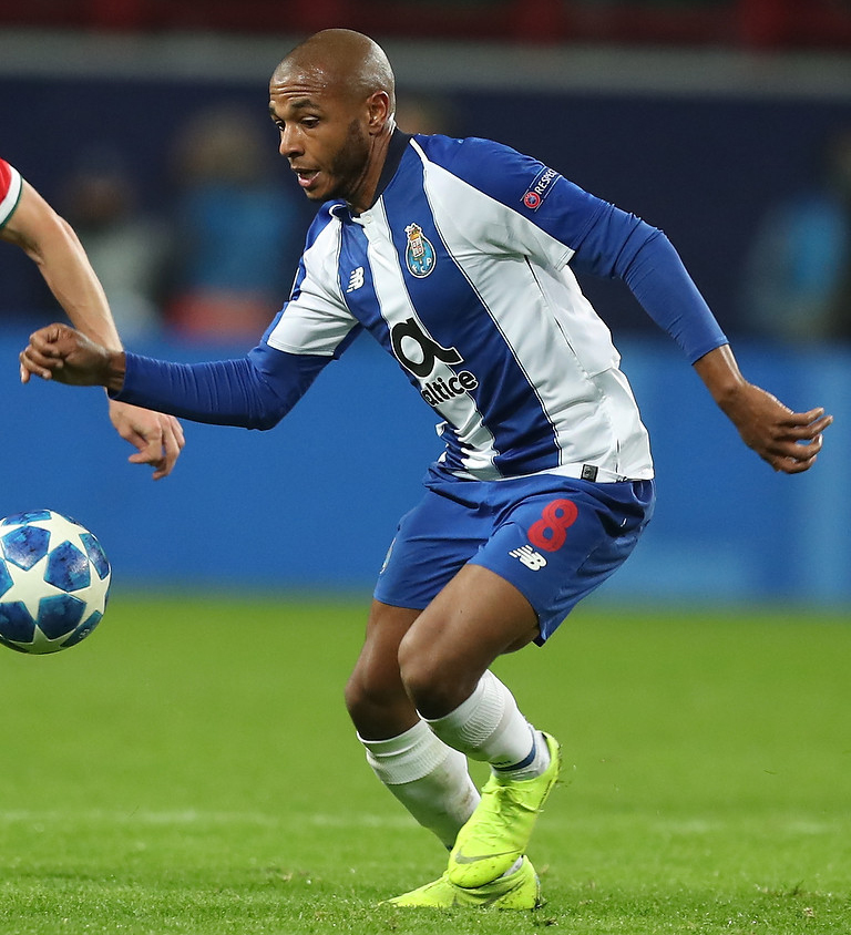 «Локомотив» терпит очередное поражение в Лиге чемпионов